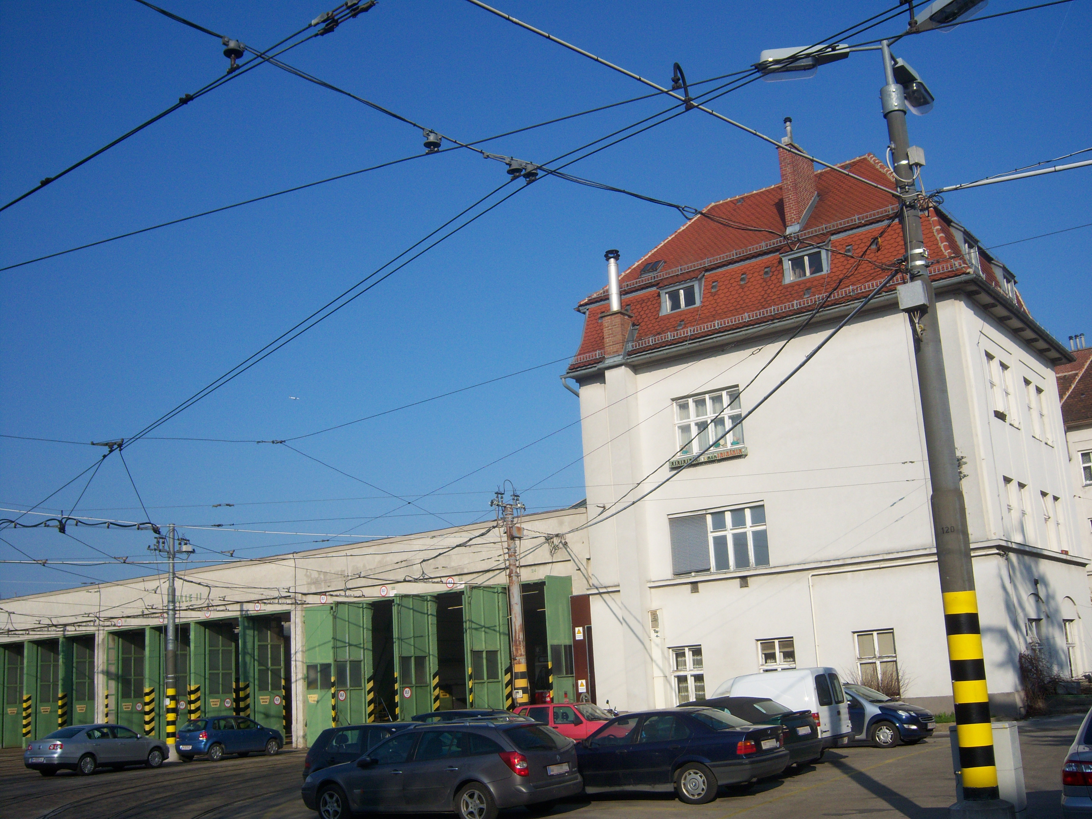 Betriebsbahnhof Speising